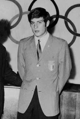 L’olimpionico Michele D’Oppido con il presidente Morace